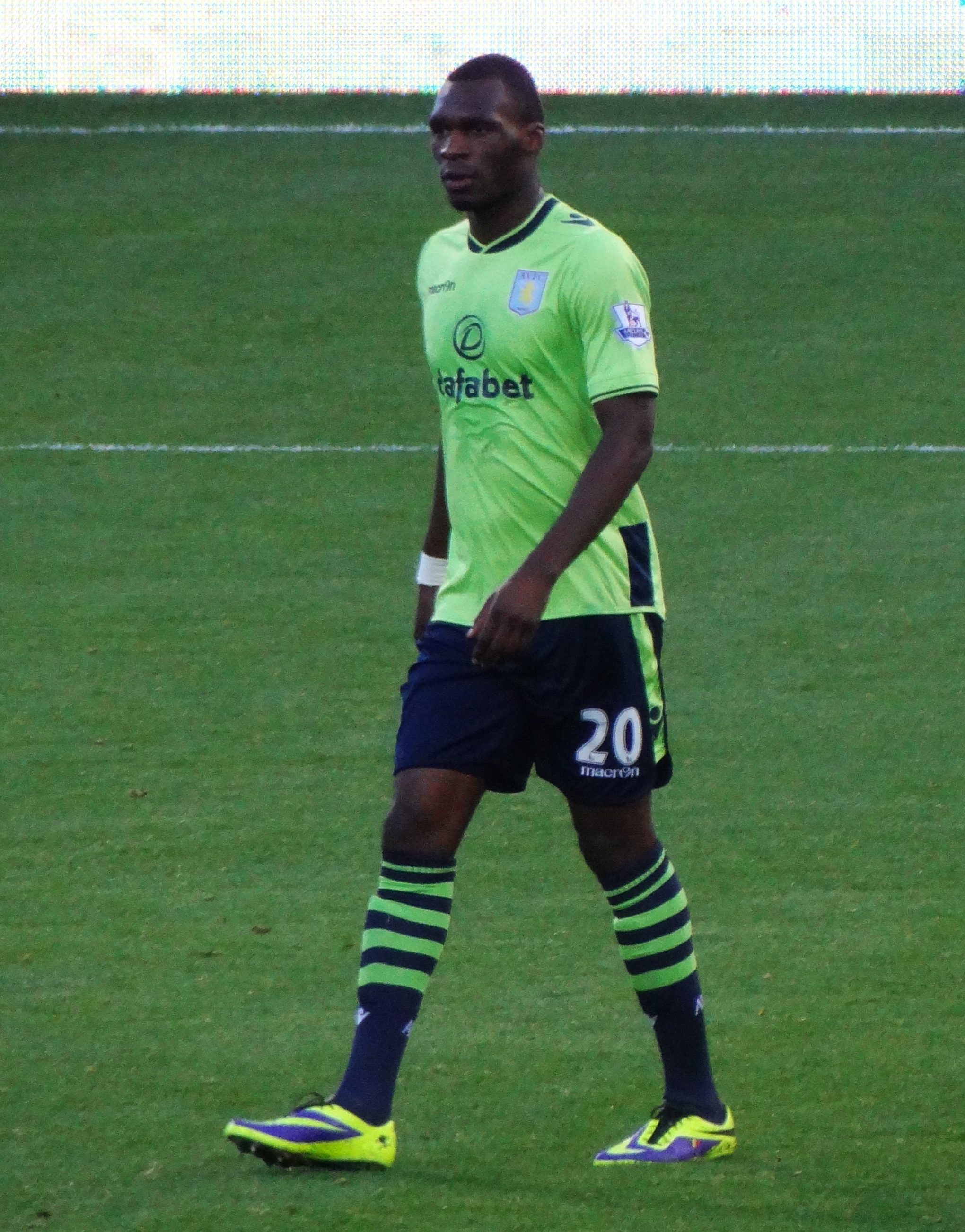 Christian Benteke, Aston Villa striker